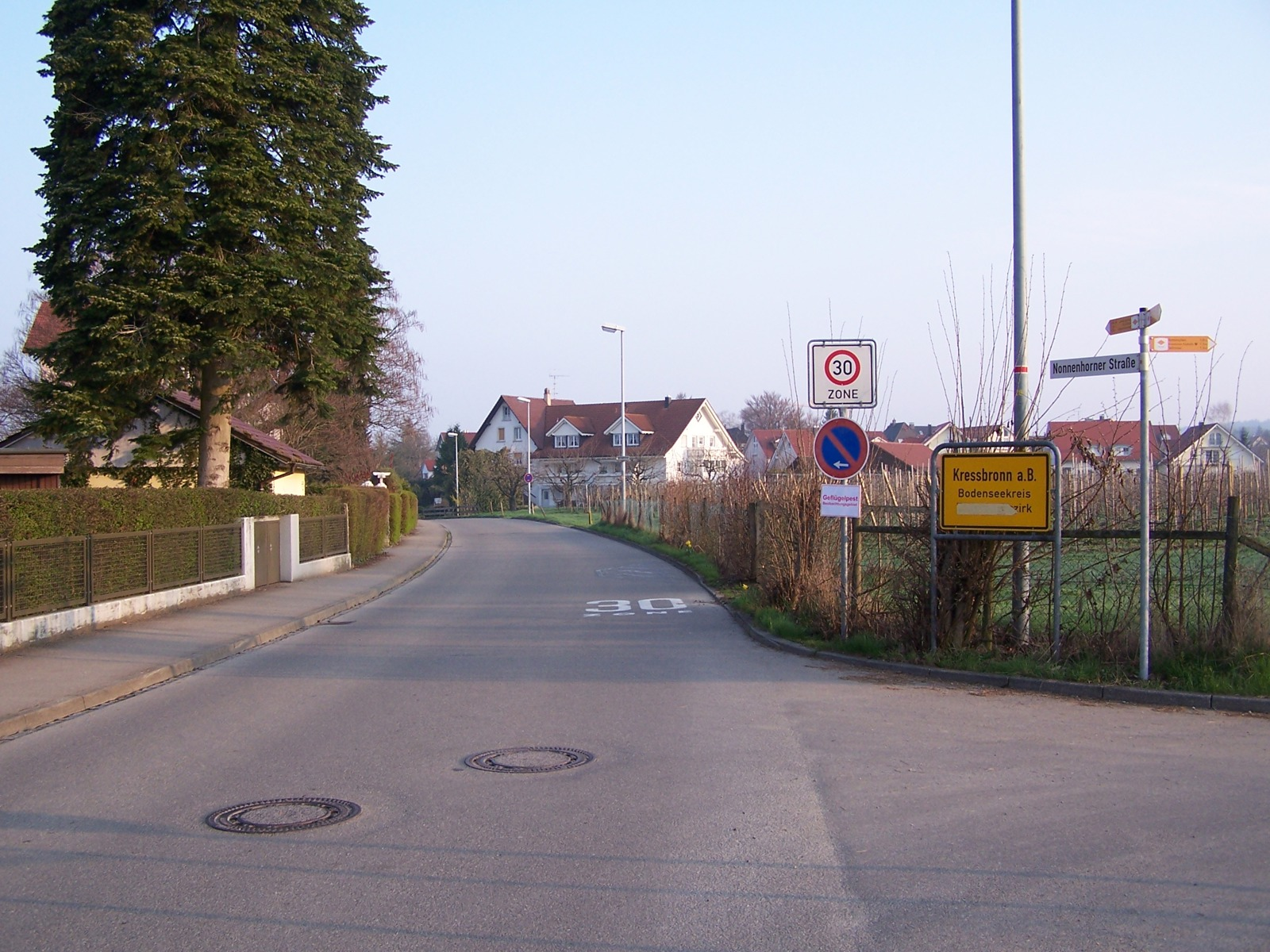 Teilstück Bodenseeradweg